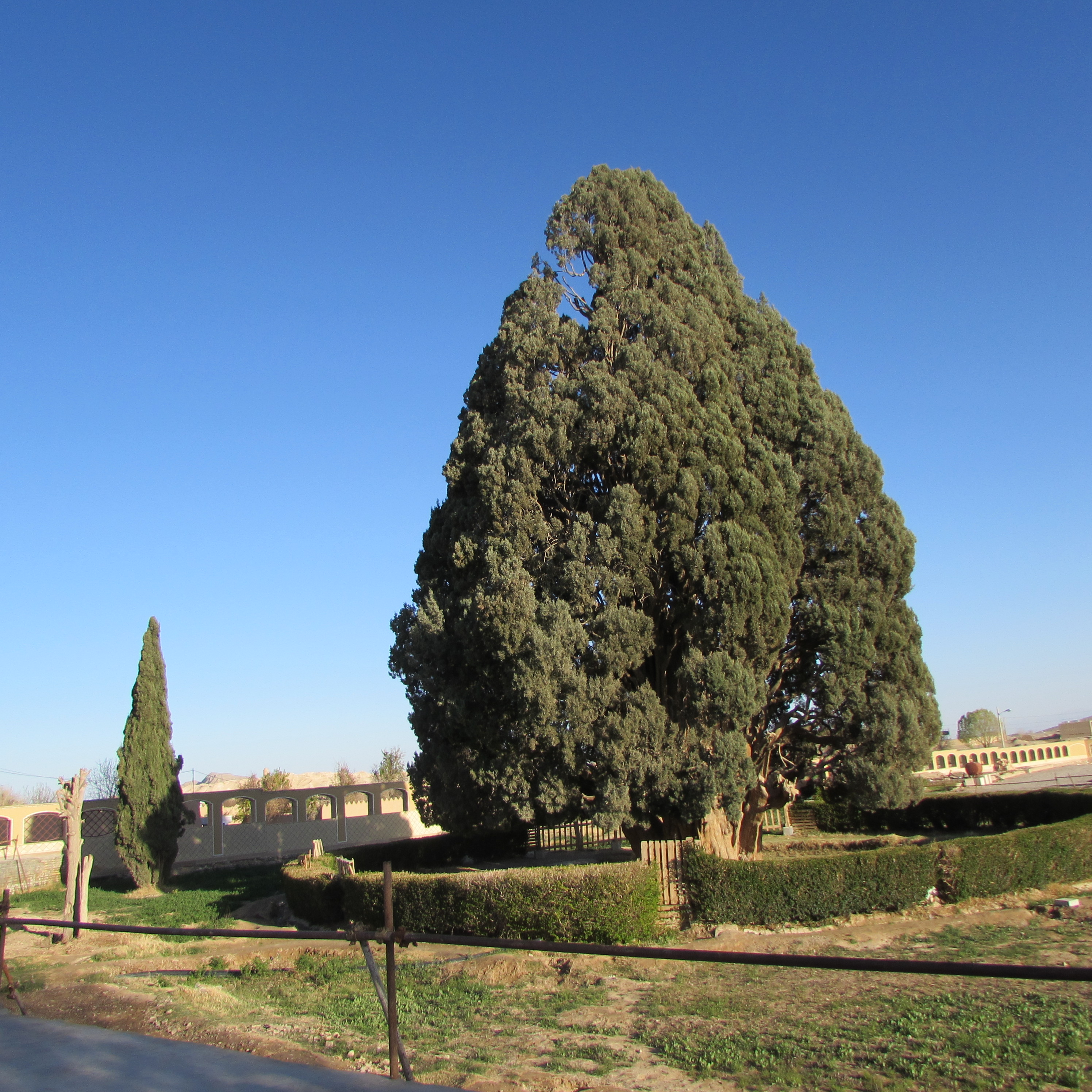 سن 4500 ساله.با بلندی 25 متر .قطر تنه 3/6 متر. قطر تاج14/07